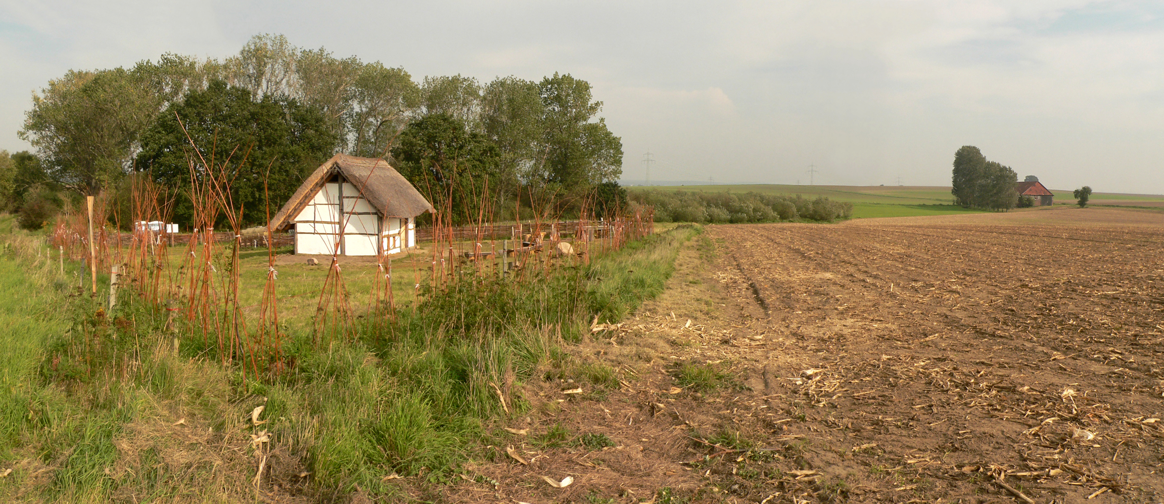 Rekonstruiertes Grubenhaus und Siedlungsfläche der Grubenhaussiedlung am Petersteich